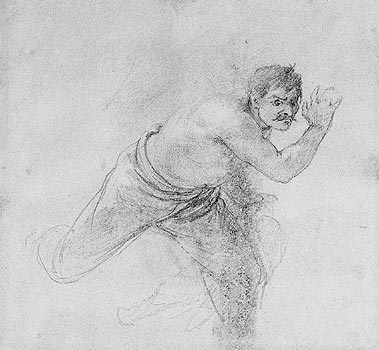 ESTUDO PARA COMBATE NAVAL DO RIACHUELO, Grafite sobre papel - 16,4 x 18,1 cm